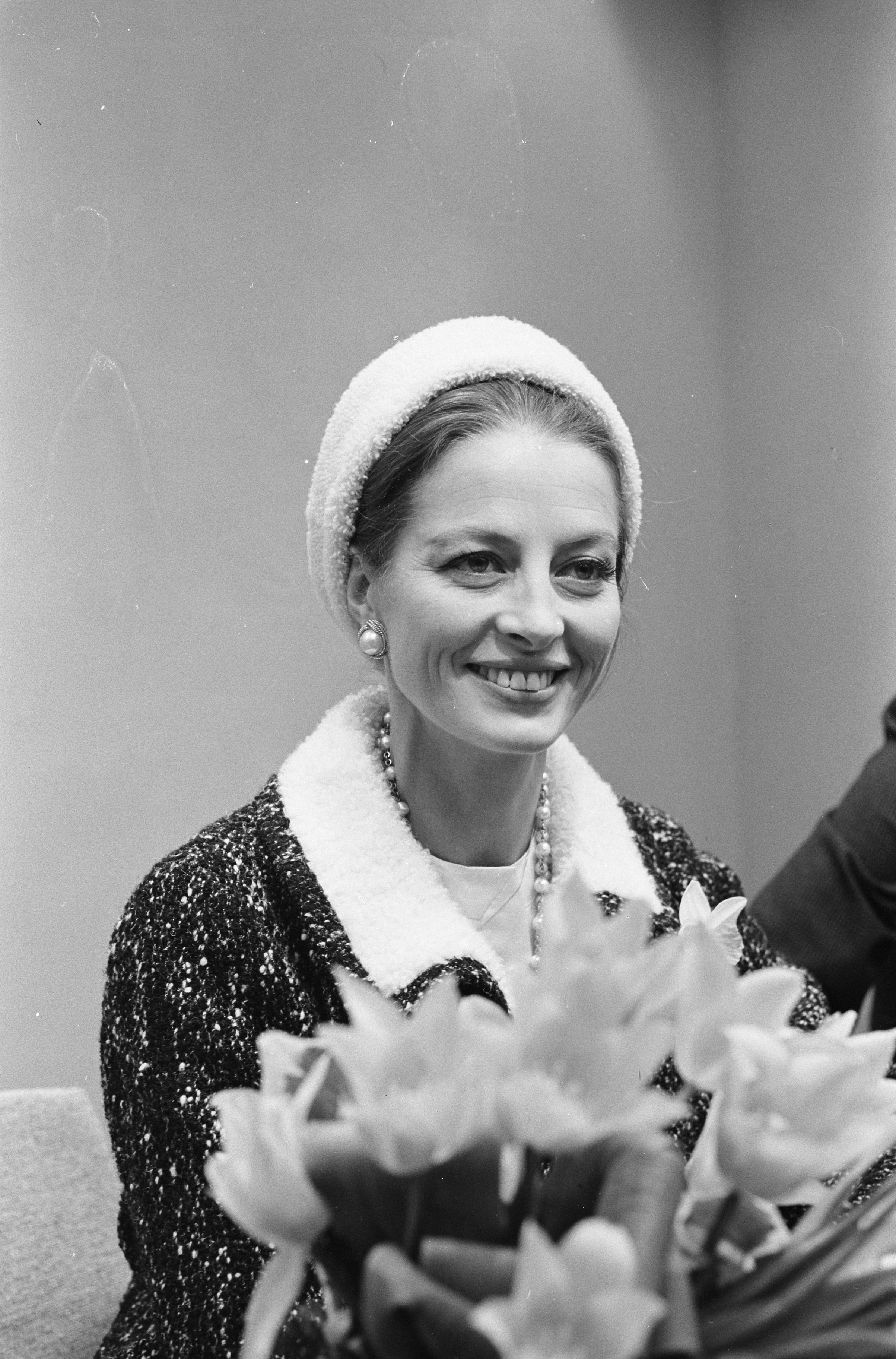 Collectie / Archief : Fotocollectie Anefo Reportage / Serie : [ onbekend ] Beschrijving : Franse filmster Capucine. Aankomst Schiphol Datum : 25 april 1962 Locatie : Noord-Holland, Schiphol Trefwoorden : aankomsten, actrices, filmsterren, portretten Persoonsnaam : Capucine Fotograaf : Pot, Harry / Anefo Auteursrechthebbende : Nationaal Archief Materiaalsoort : Negatief (zwart/wit) Nummer archiefinventaris : bekijk toegang 2.24.01.05 Bestanddeelnummer : 913-8105